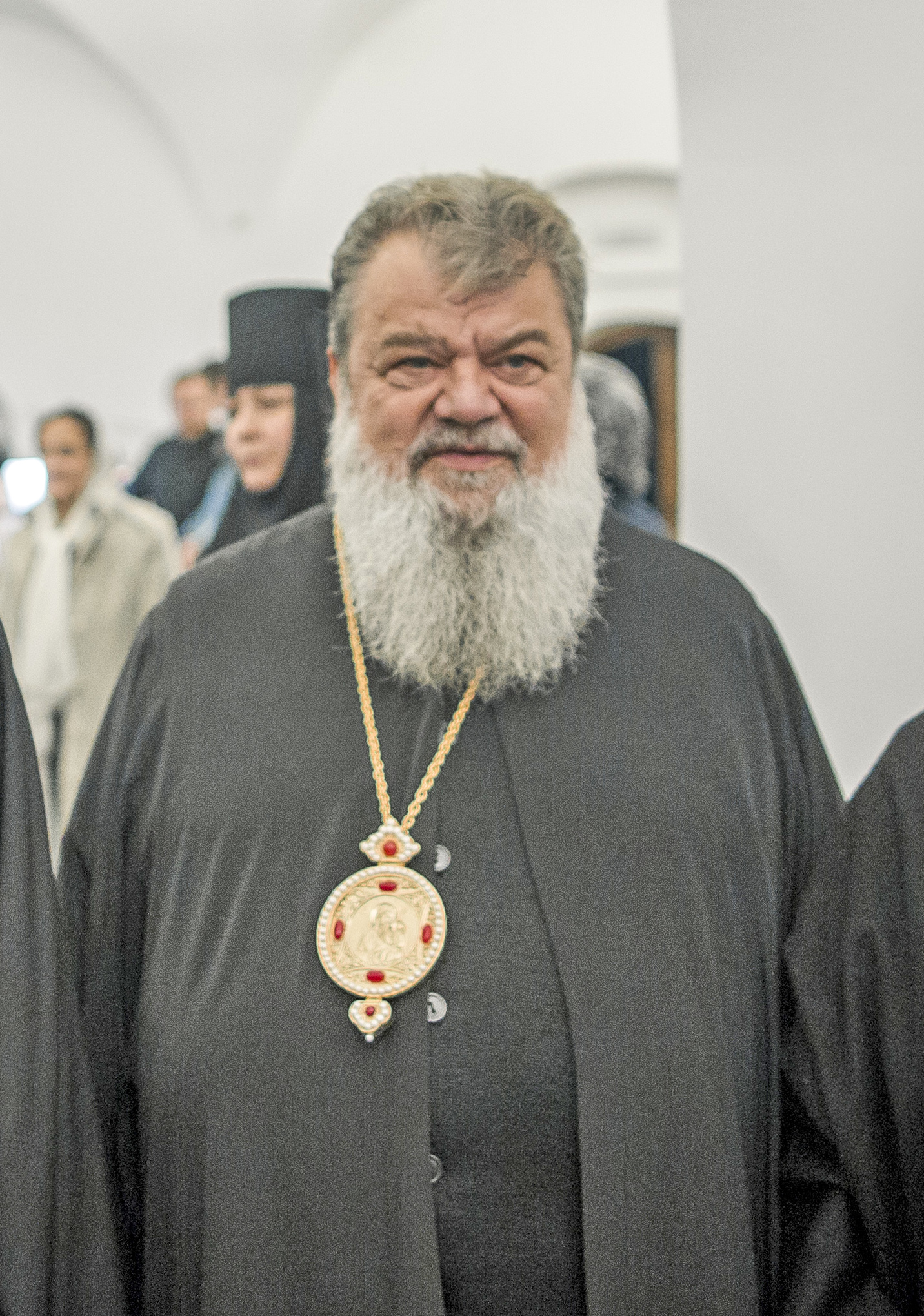 11 ноября 2017, Литургия в Тихвинском Богородичном Успенском монастыре / 11 November 2017, Divine Liturgy in the Tikhvin Assumption Monastery